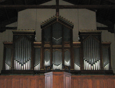 Evangelische Kirche Meckesheim